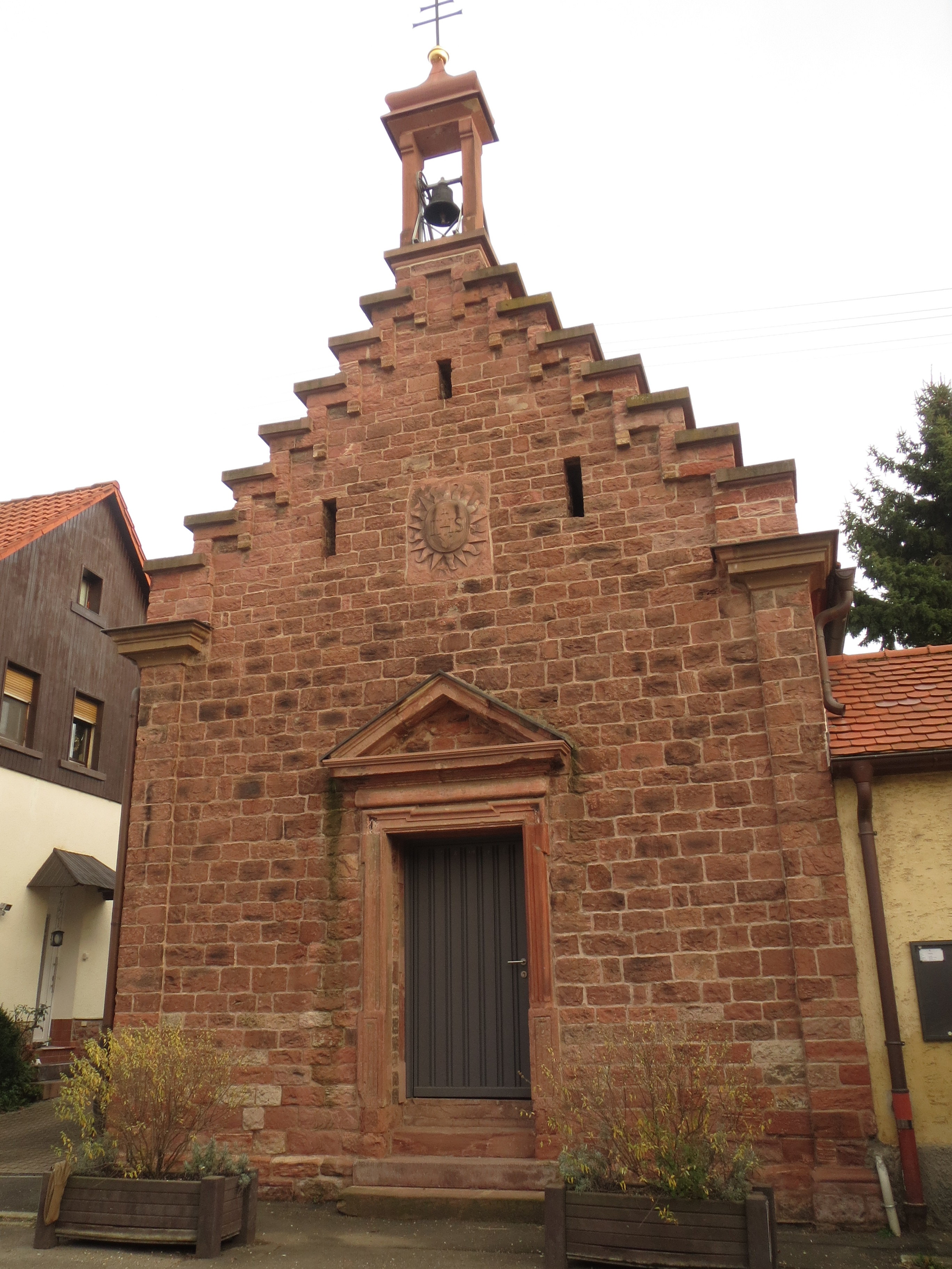 Die 1726 errichtete Kapelle Schwabenheims